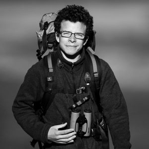 Michel d'Oultremont en 2014, de face